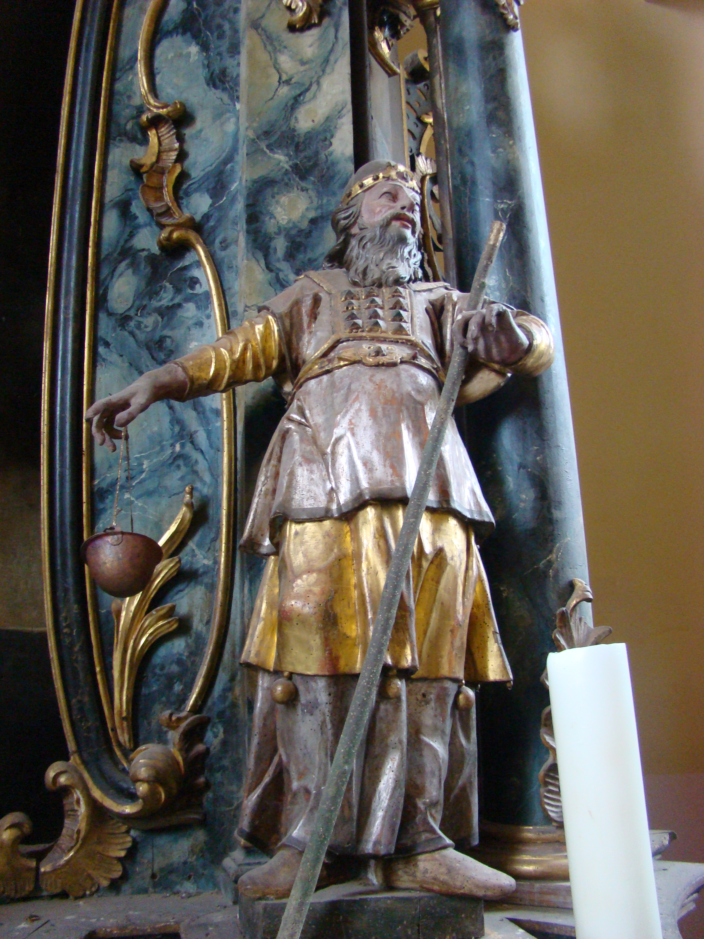 Biserica evanghelică, oraș Miercurea Sibiului, județul Sibiu 01